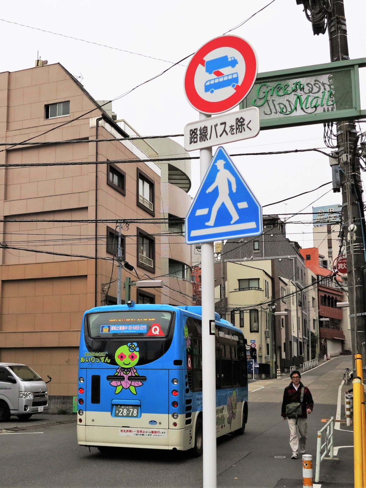 千駄ヶ谷付近の大型車進入禁止の住宅街を通過するハチ公バス